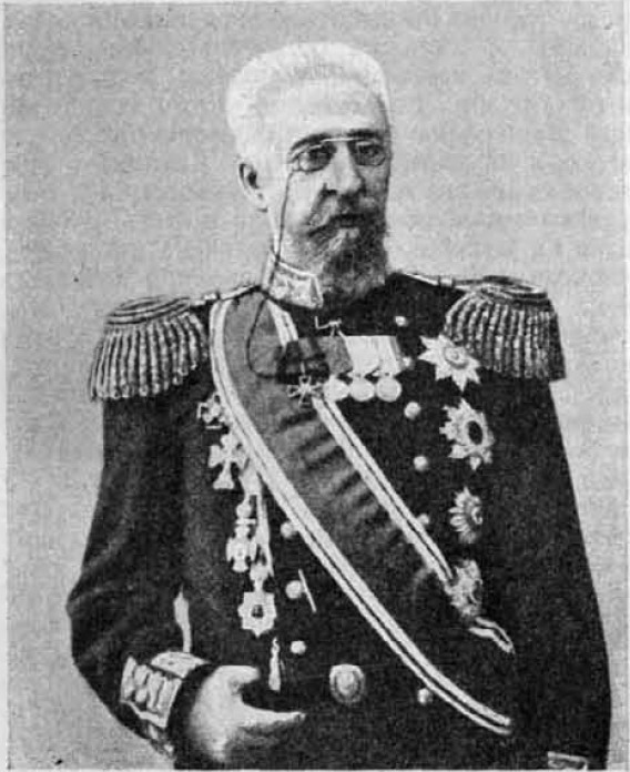 Адмирал Пётр Алексеевич Безобразов. Данное изображение было использовано в статье «Безобразов, Петр Алексеевич» опубликованной в четвёртом томе «Военной энциклопедии», который был издан книгоиздательским товариществом Ивана Дмитриевича Сытина в 1911 году в столице Российской империи городе Санкт-Петербурге.